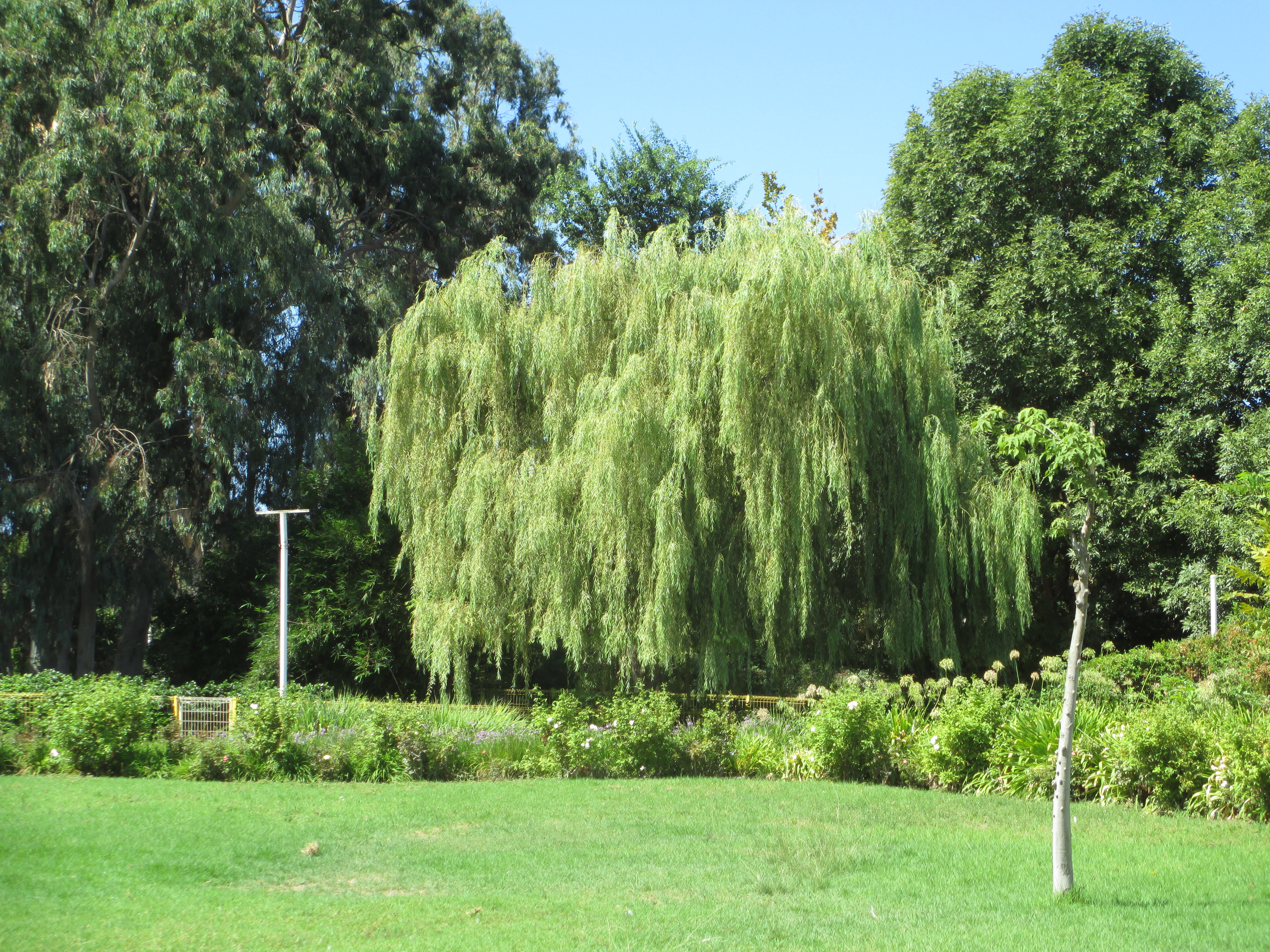 ערבה בוכיה בגן הבוטני זואולוגי בנהריה